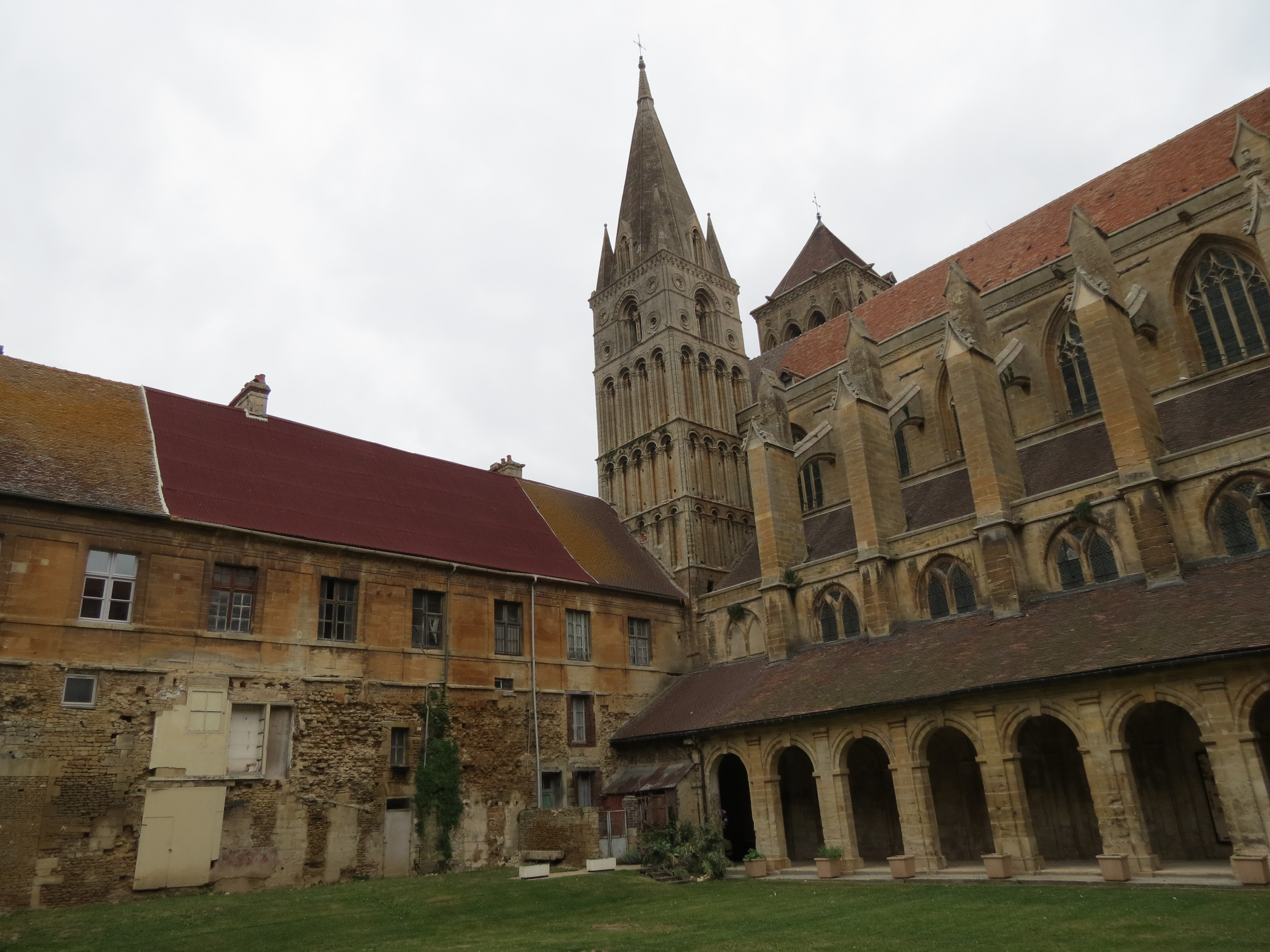 Cloître de Saint-Pierre-sur-Dives - vue tour Saint-Michel.